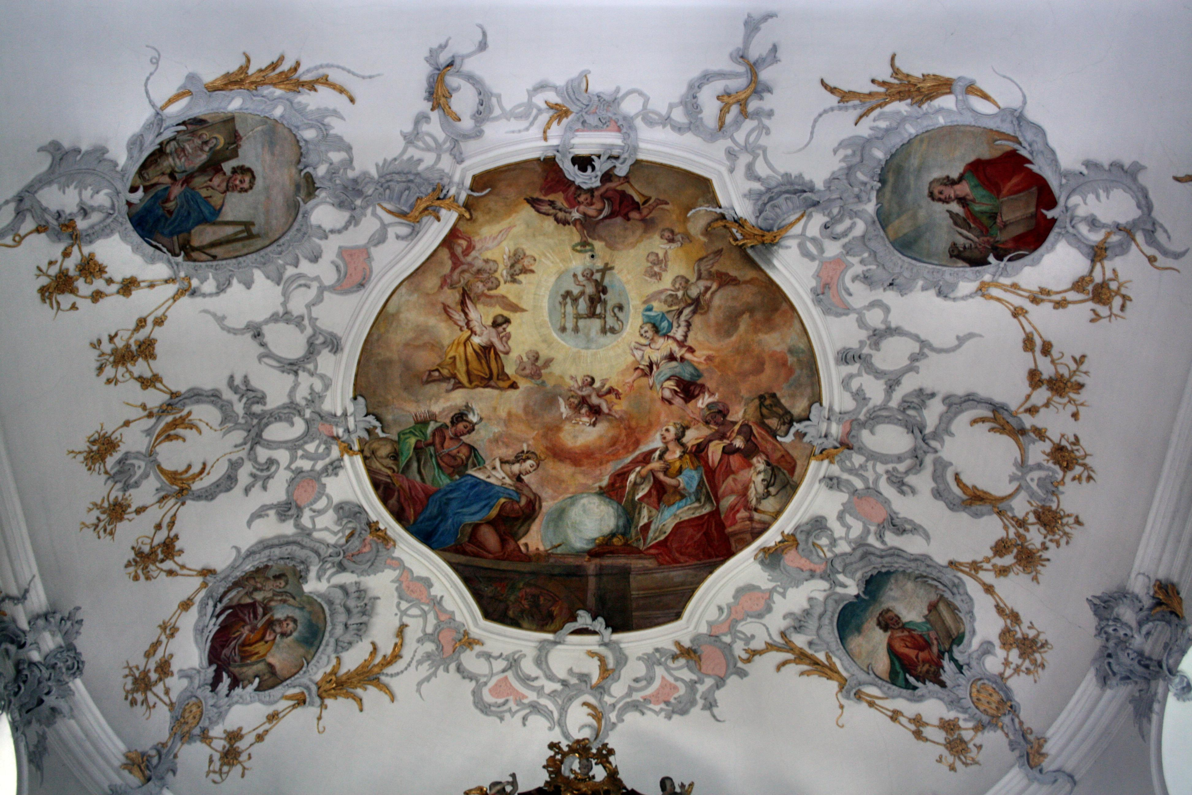 Deckenfresko über dem Hochaltar, St. Ulrich Amendingen